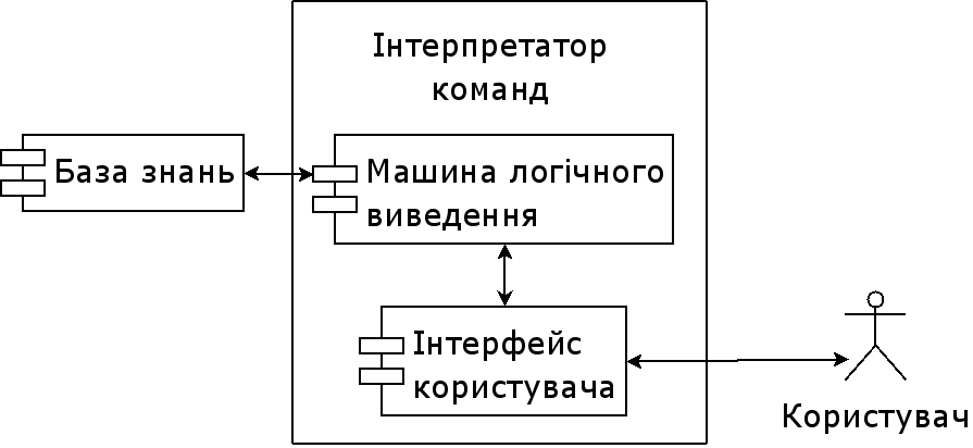 Структура типової експертної системи, у вигляді UML діаграми